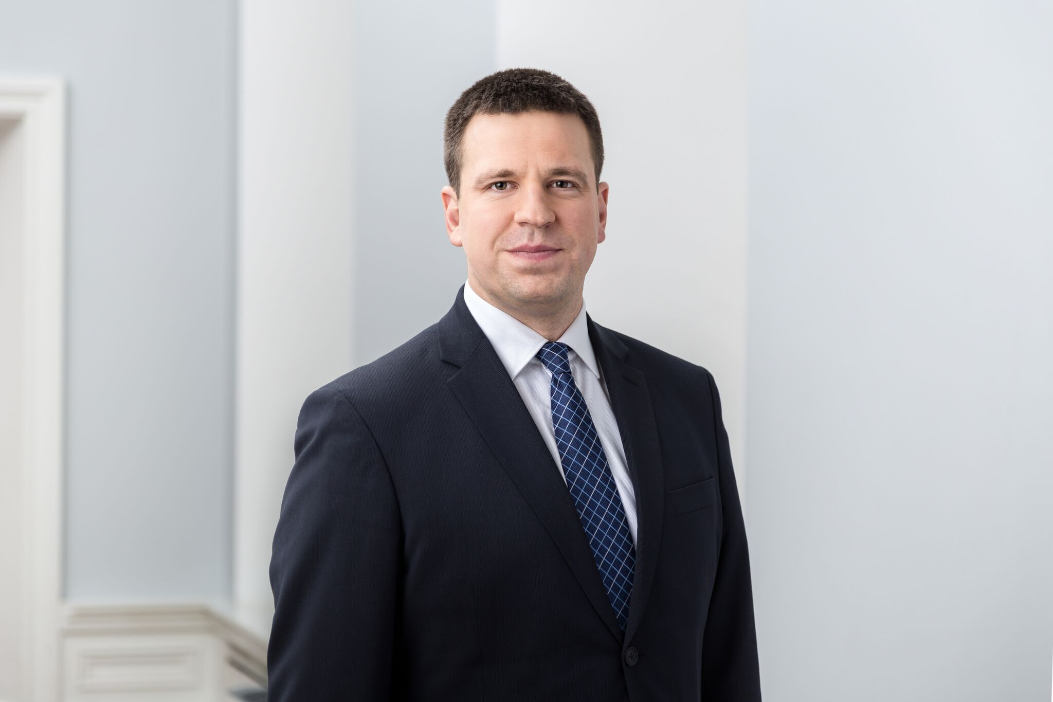 Jüri Ratas